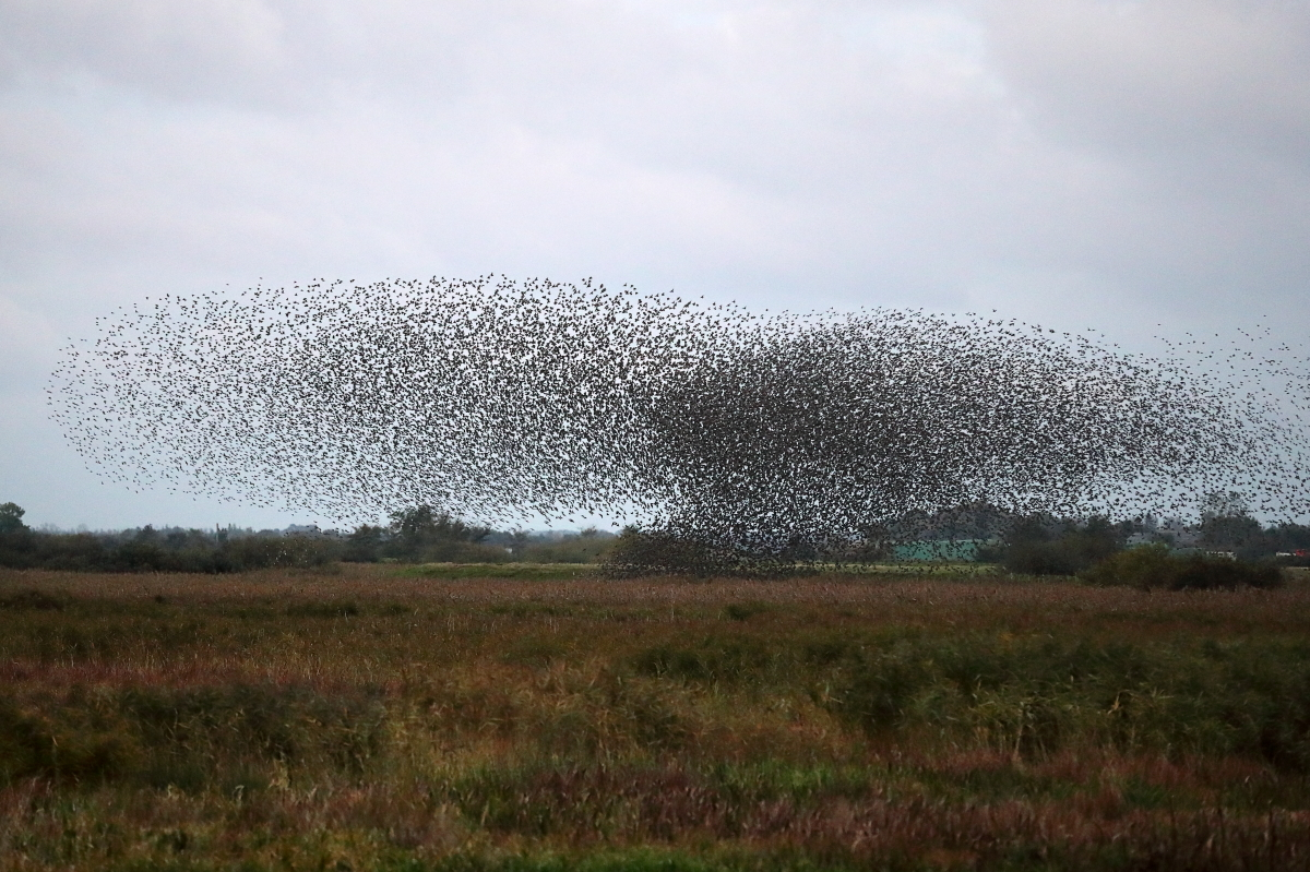 Starenschwarm am Haasberger See in Nordfriesland